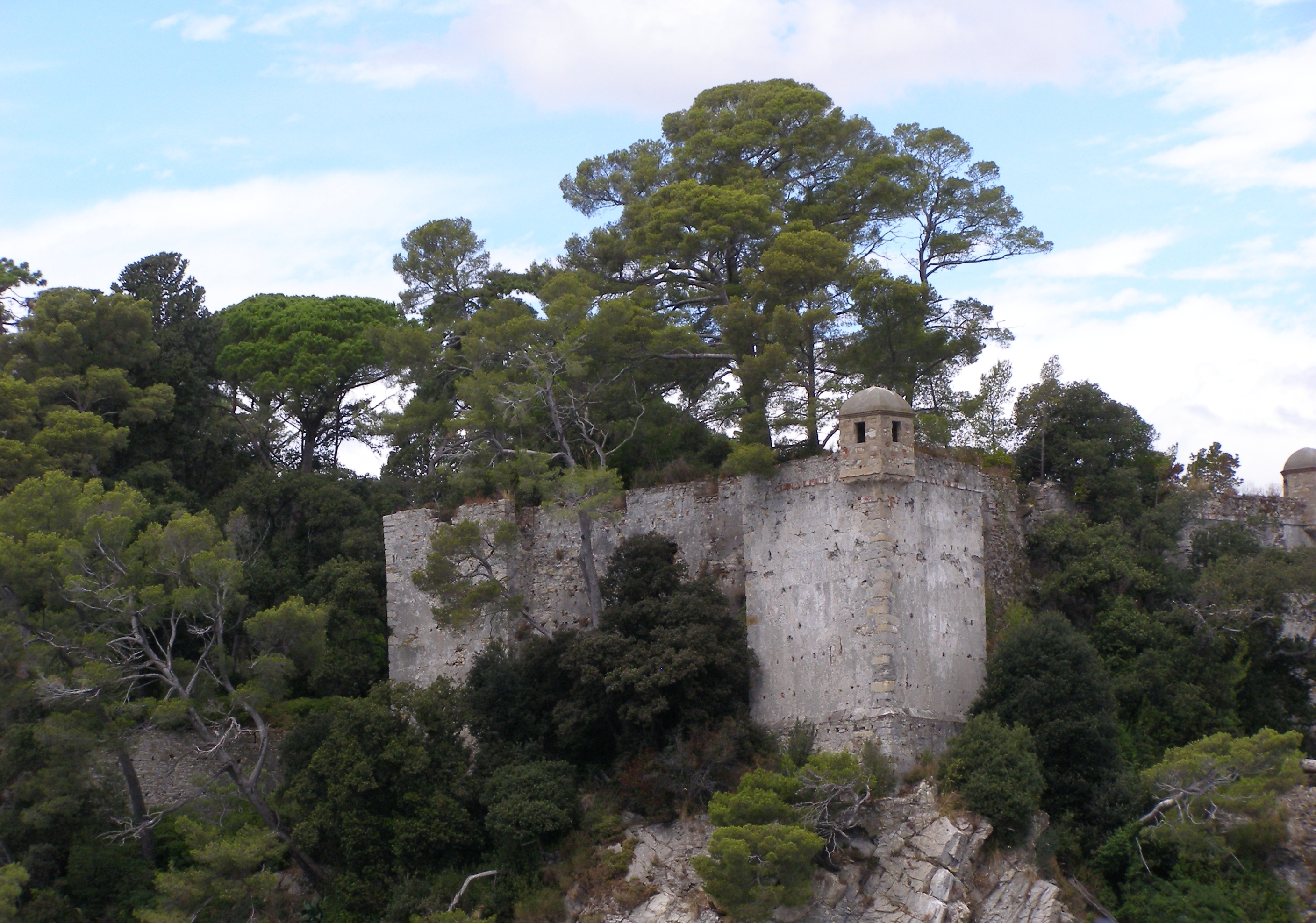 Rapallo - Castello di Punta Pagana